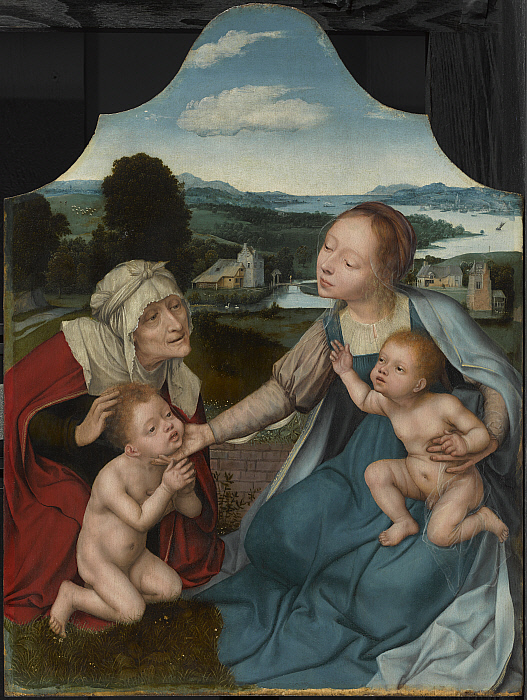 Quentin Metsys Vierge à l'enfant avec Sainte Elizabeth et Saint Jean-Baptiste, c. 1520–25, Huile sur bois, 63 x 48.2 cm